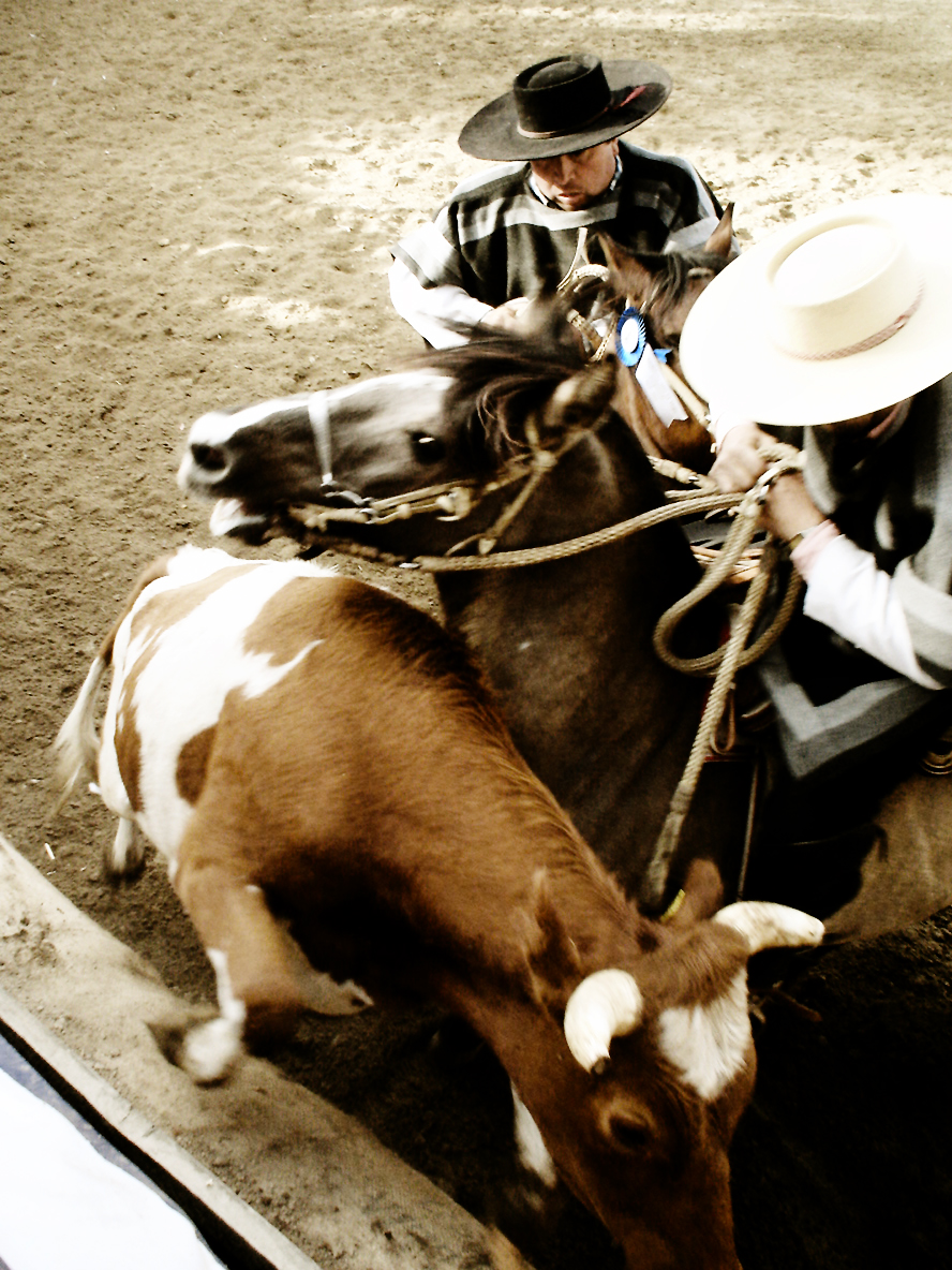 rodeo en alto el yugo.